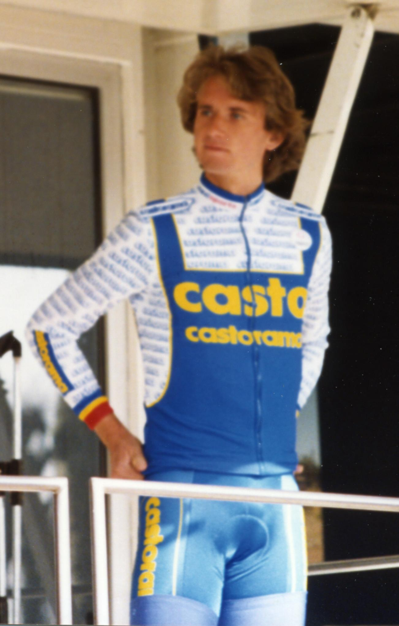 PARIS-NICE 1993